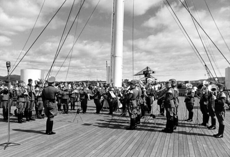 Die Kapelle der B.d.O. Norwegen auf dem Lazarettschiff Wilhelm Gustloff spielt für die verwundeten Soldaten